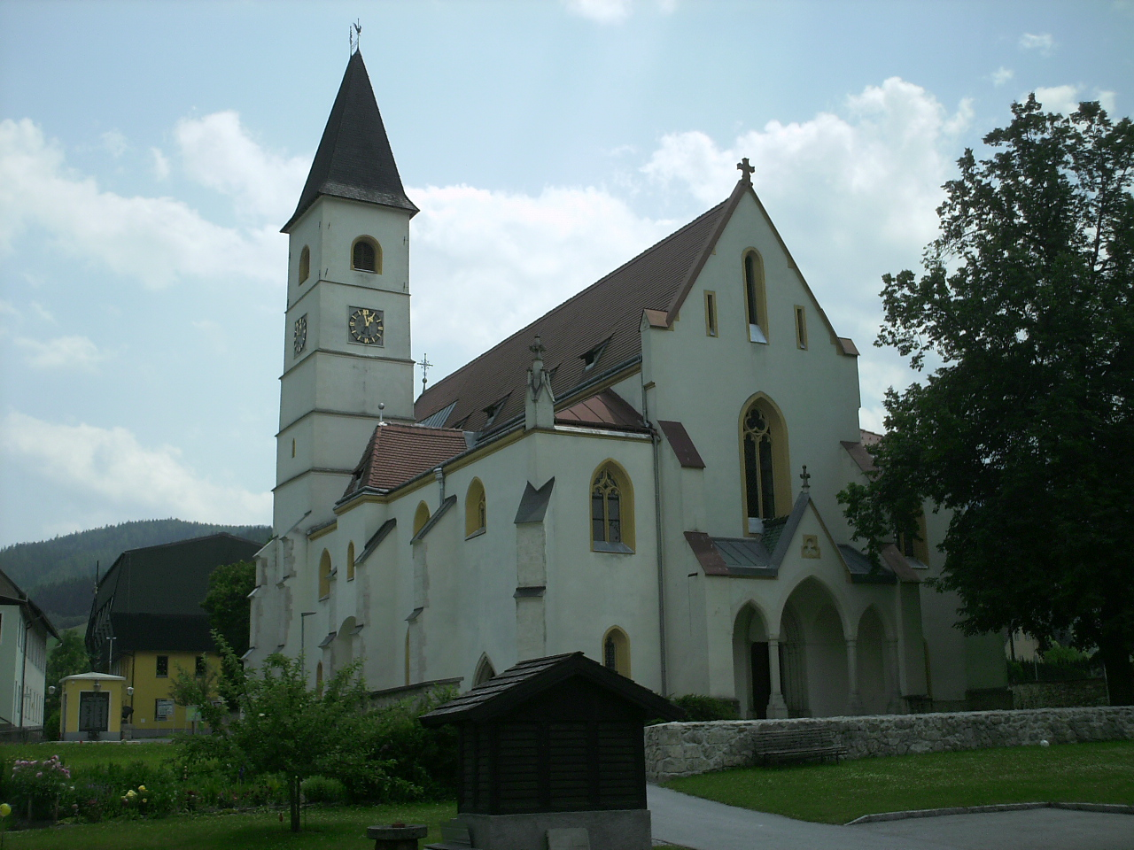 Kath. Pfarrkirche Mariae Himmelfahrt in Spital am Semmering/Österreich. Object location47° 36′ 54.02″ N, 15° 45′ 18.12″ E